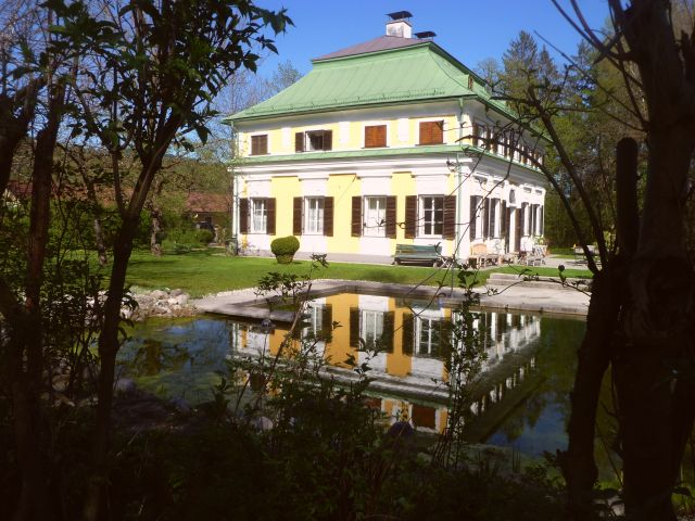 Spauer Schlössl in Thalgau